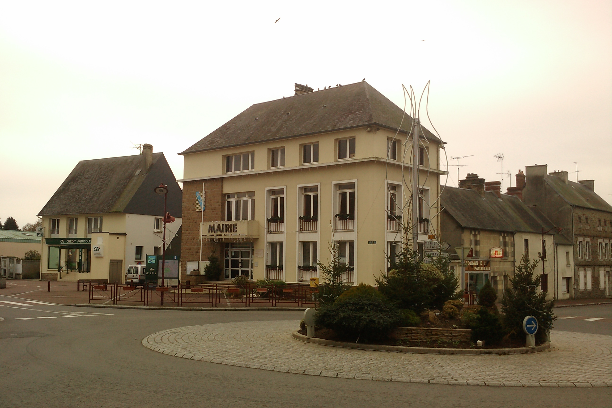 Canisy